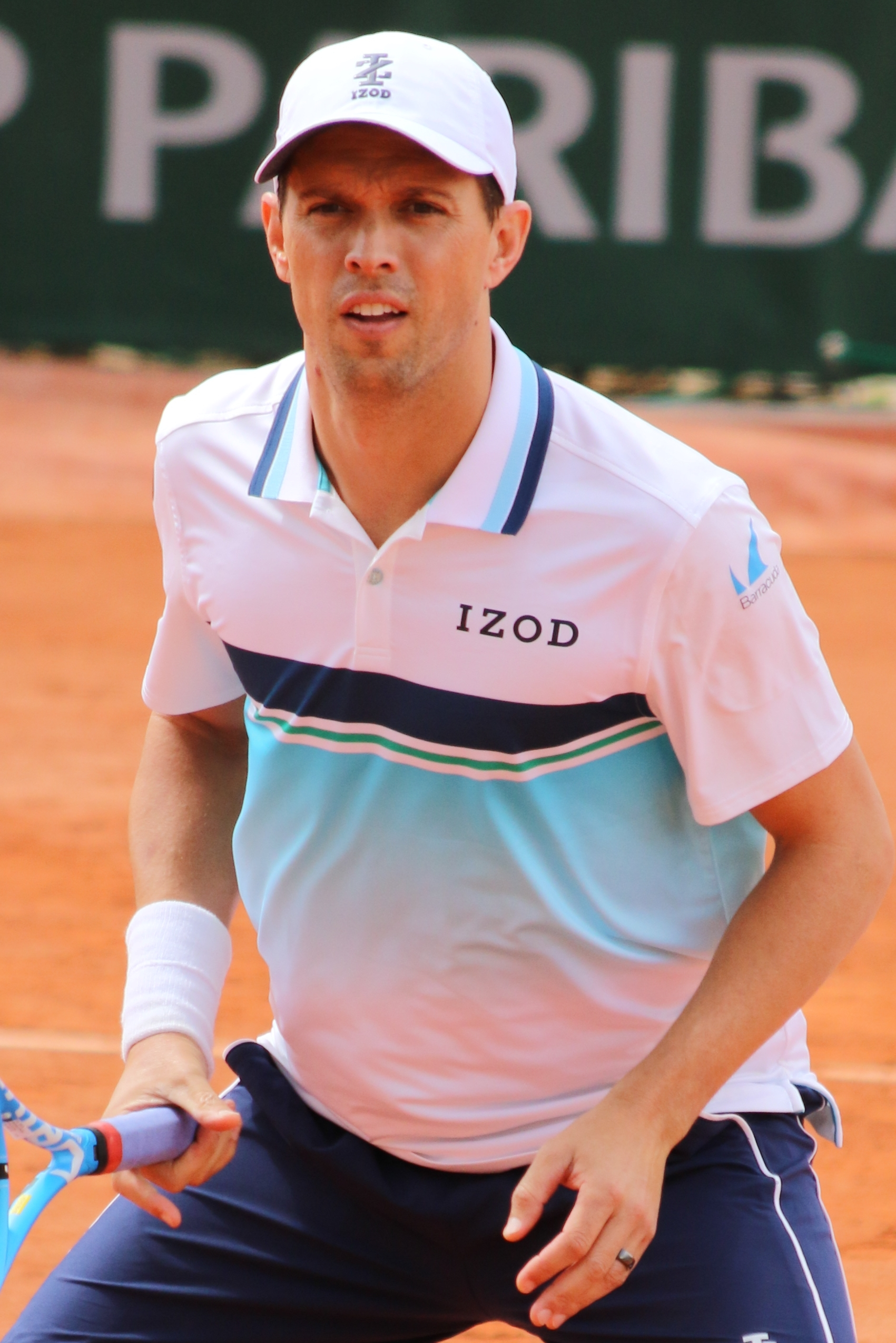 Bryan M. RG19 (12)